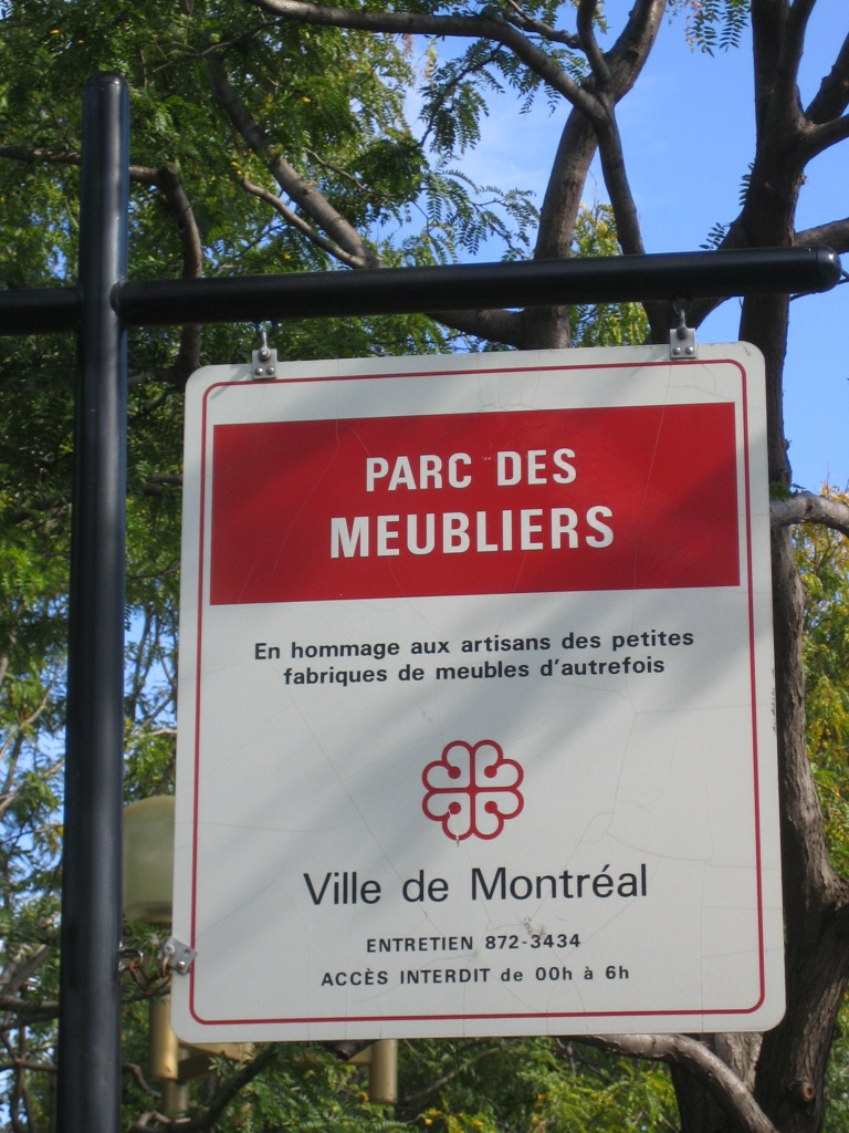 Descriptive name plate of parc des Meubliers, Montréal (Petite-Bourgogne)